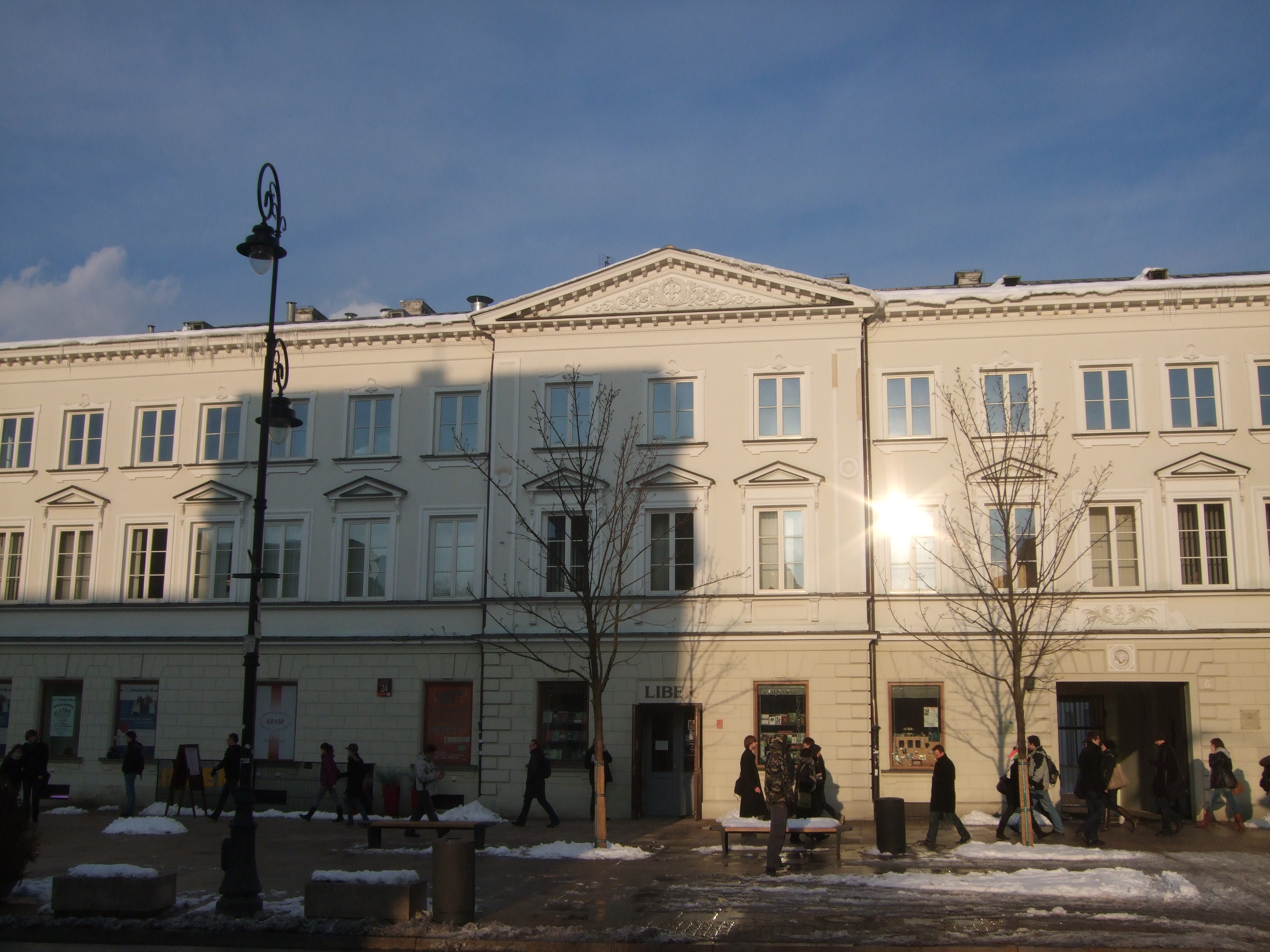 Widok